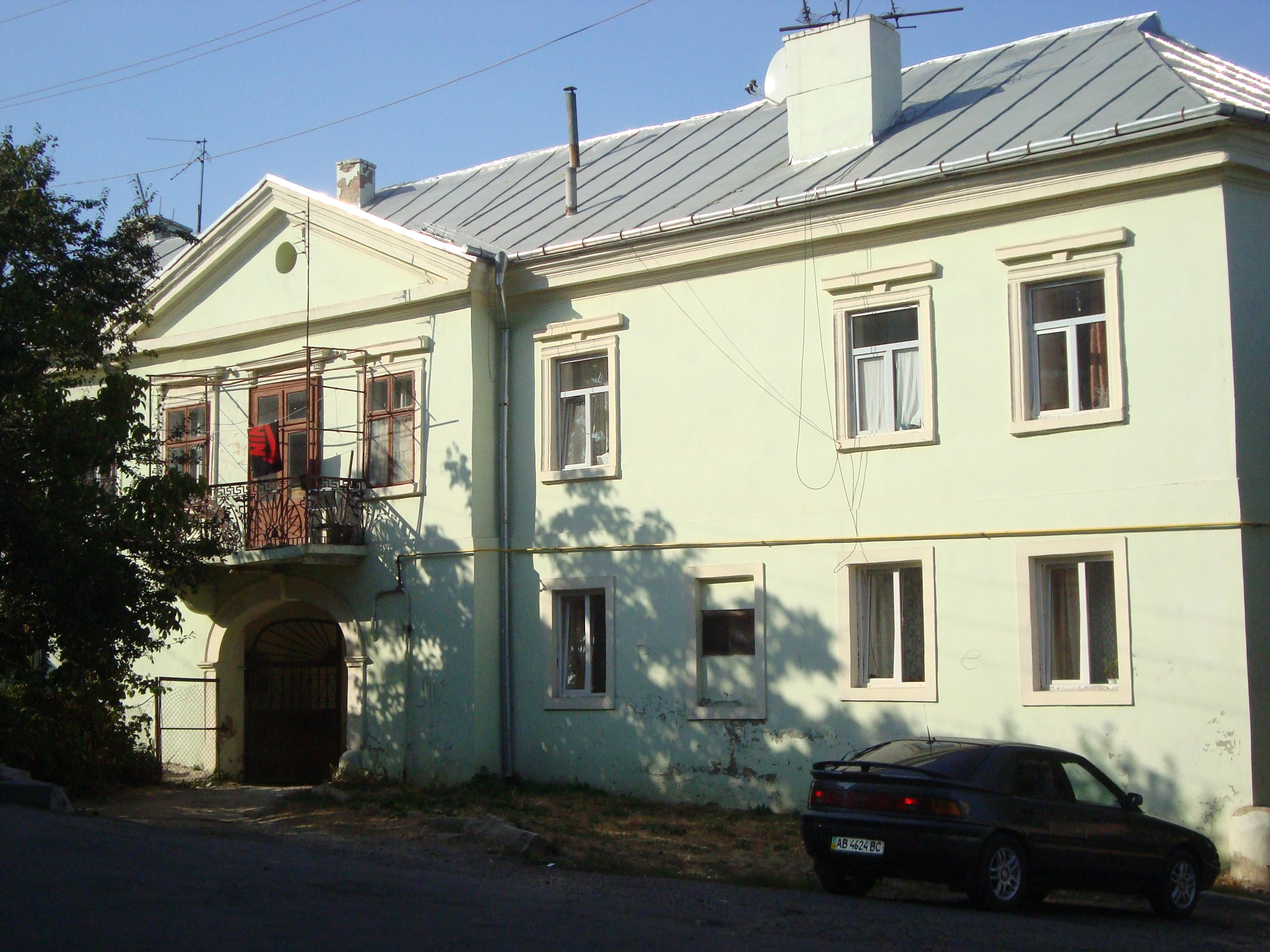 Cernauti. Palatul Hurmuzachi-Logotheti